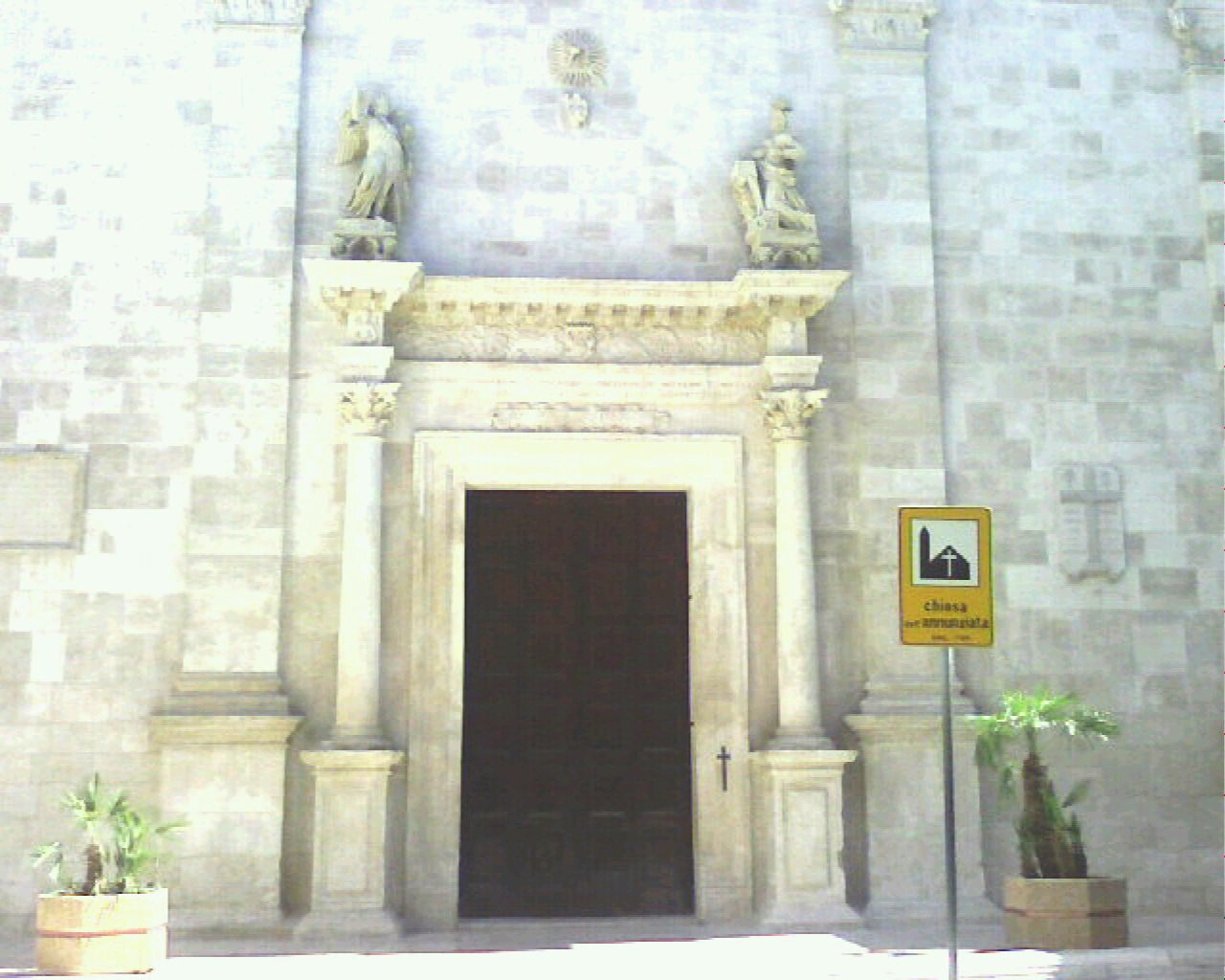 chiesa matrice-modugno